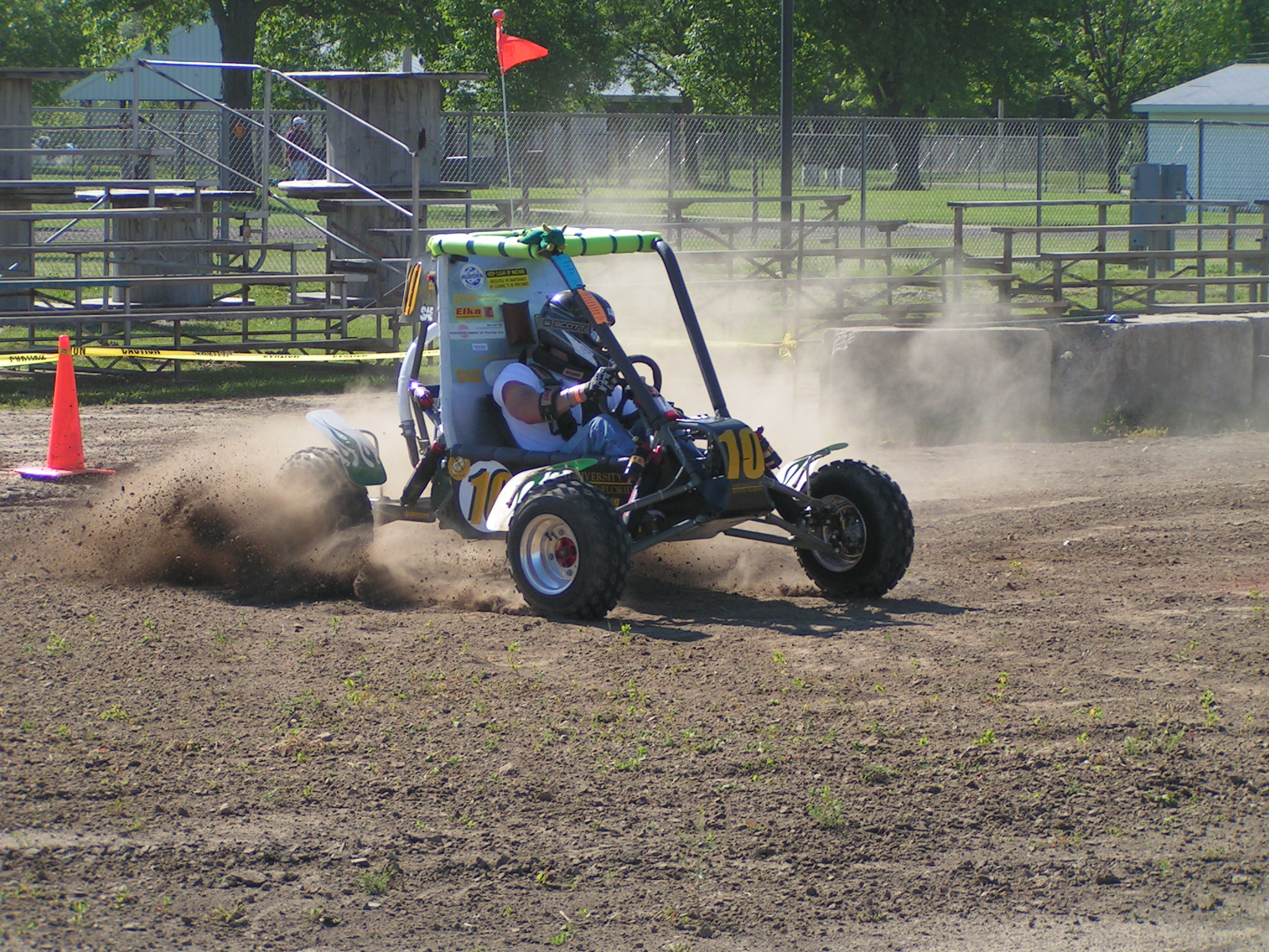 USF Mini Baja 2004 Midwest Testing